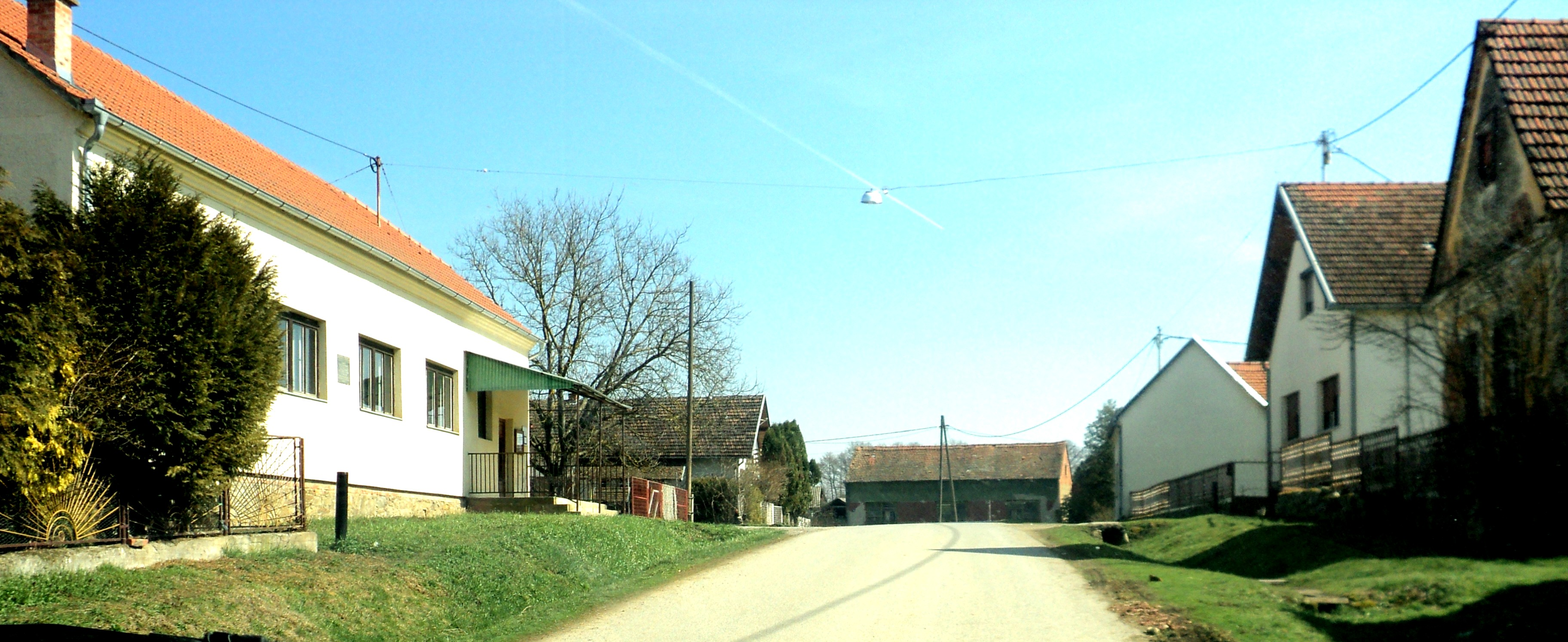 Selo Bjeliševac